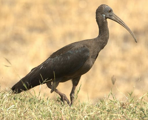 Indian Black Ibis Pseudibis papillosa, subadult